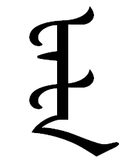 фафахэргэнь